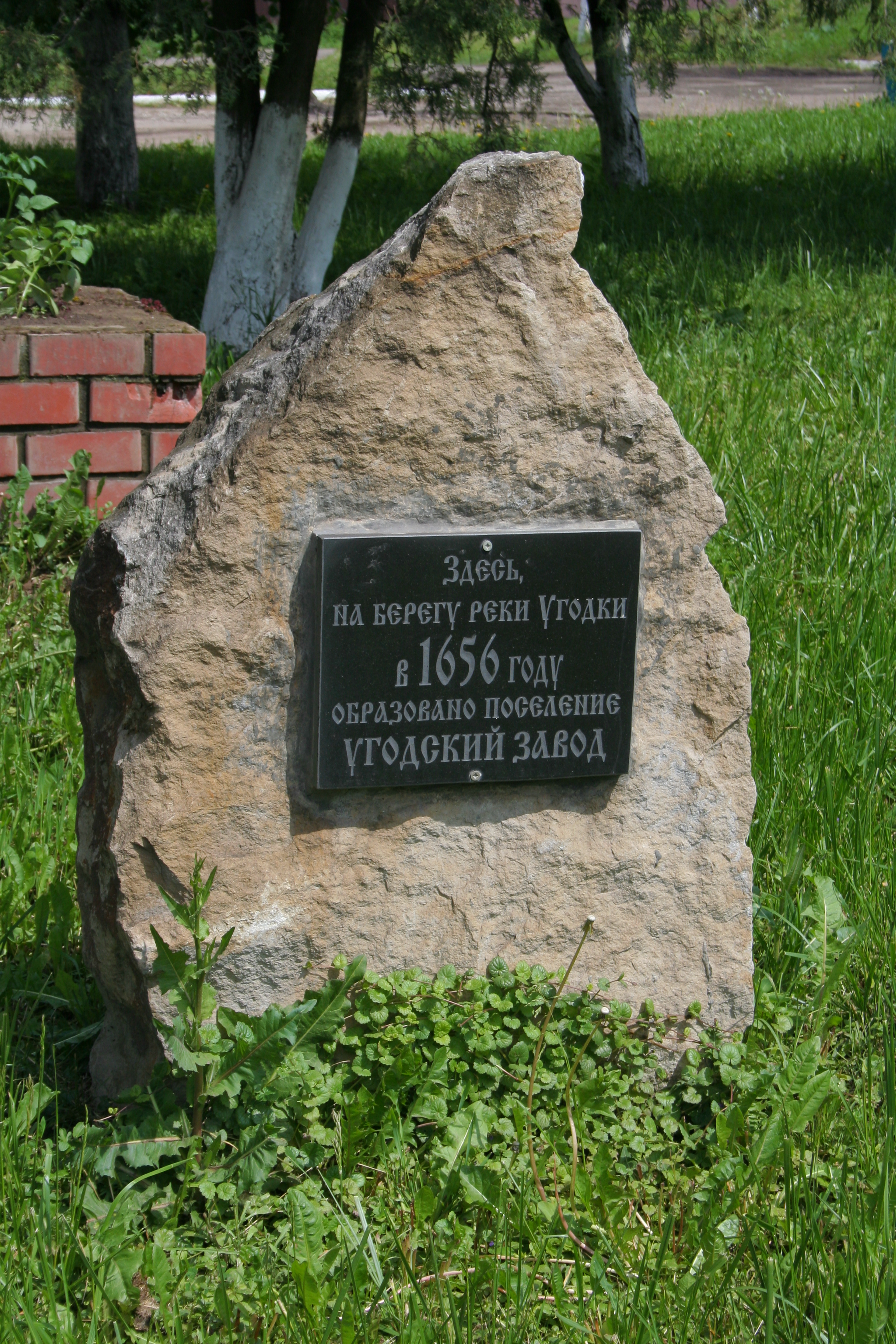 Stadt Schukow, Oblast Kaluga, Russland. Gedenkstein zur Stadtgründung.